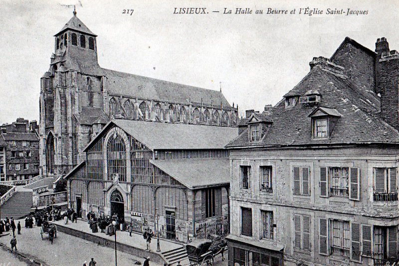 Lisieux, département du Calvados, sur une carte postale de la fin du 19e ou du début du 20e siècle. Vue plongeante sur la Halle au beurre, de l'avenue Victor Hugo. Vue du Sud-Ouest vers le Nord-Est. L'église Saint Jacques est en arrière-plan.